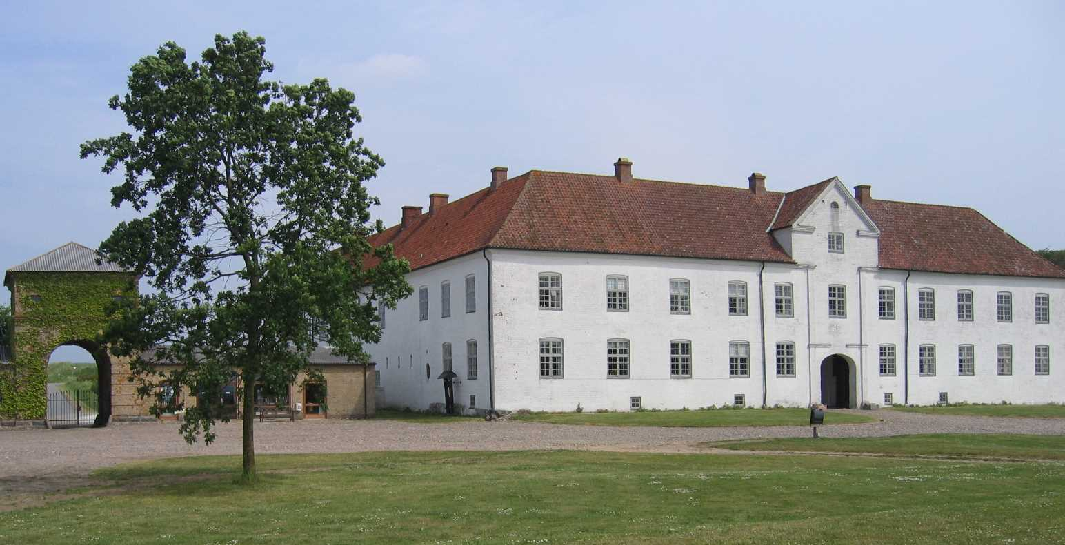 Outside Børglum kloster